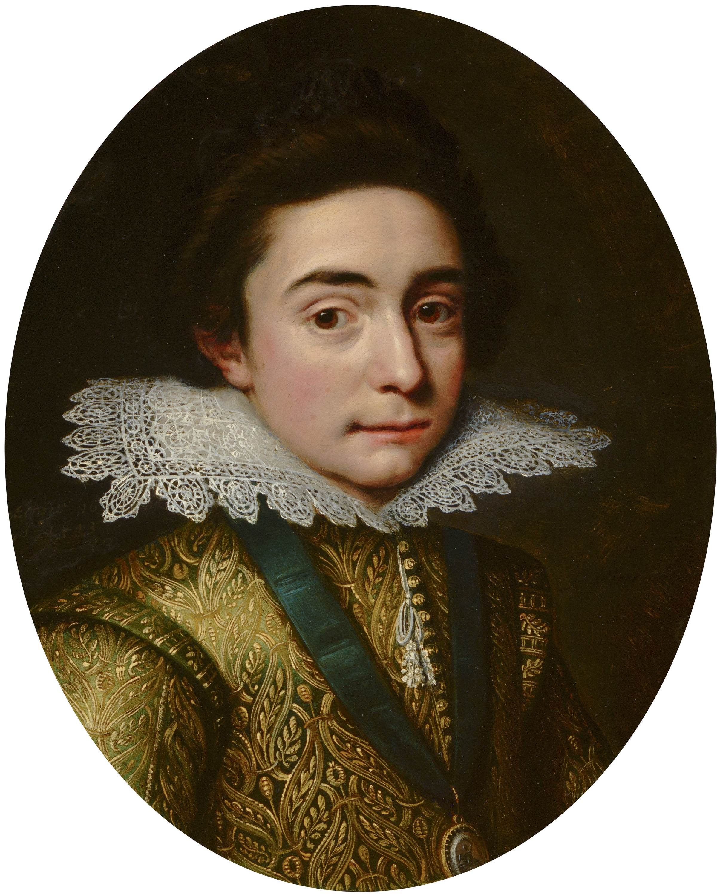 Der junge Friedrich V. im Jahre 1613.